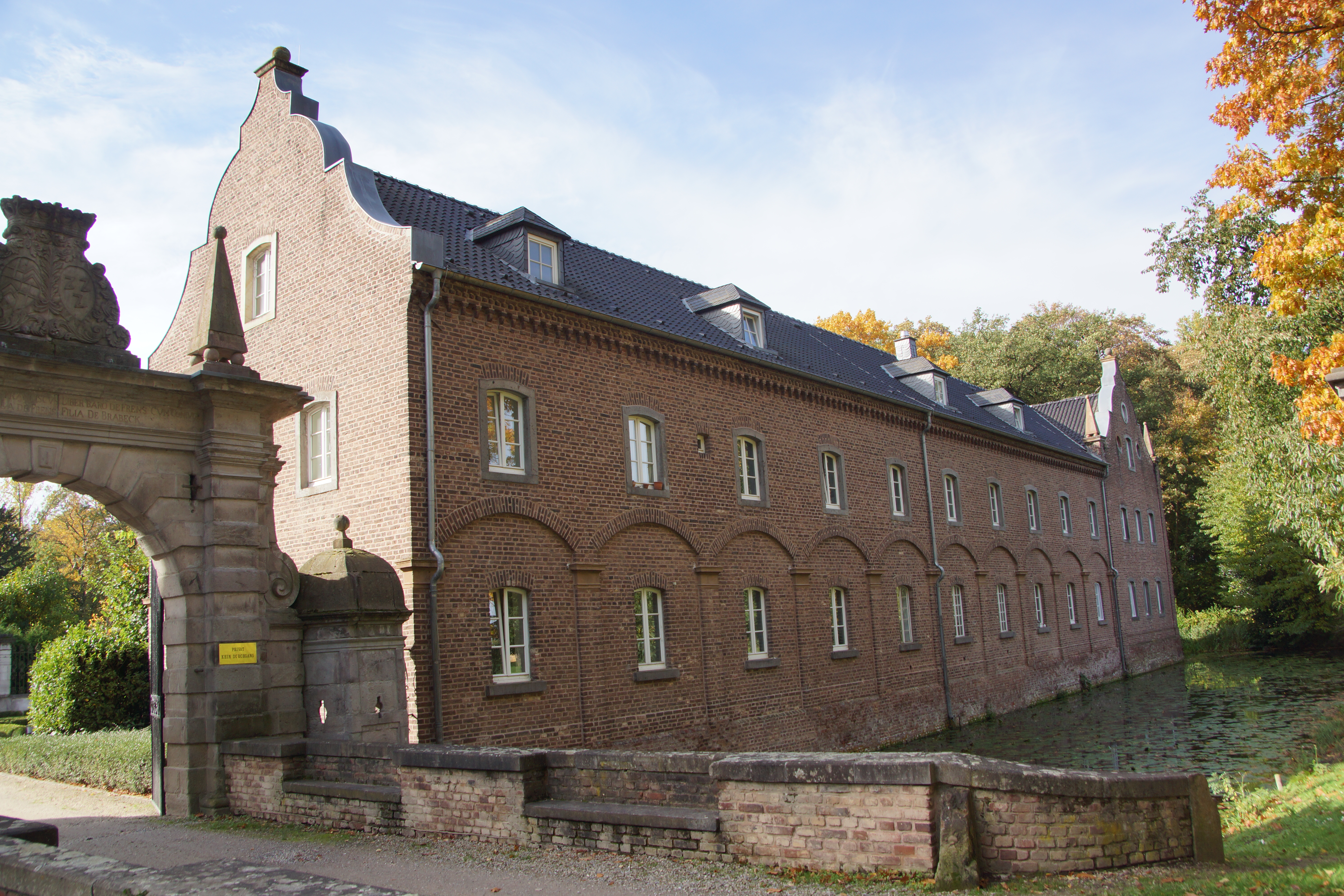 Schloss Frens, Vorburg, Westteil